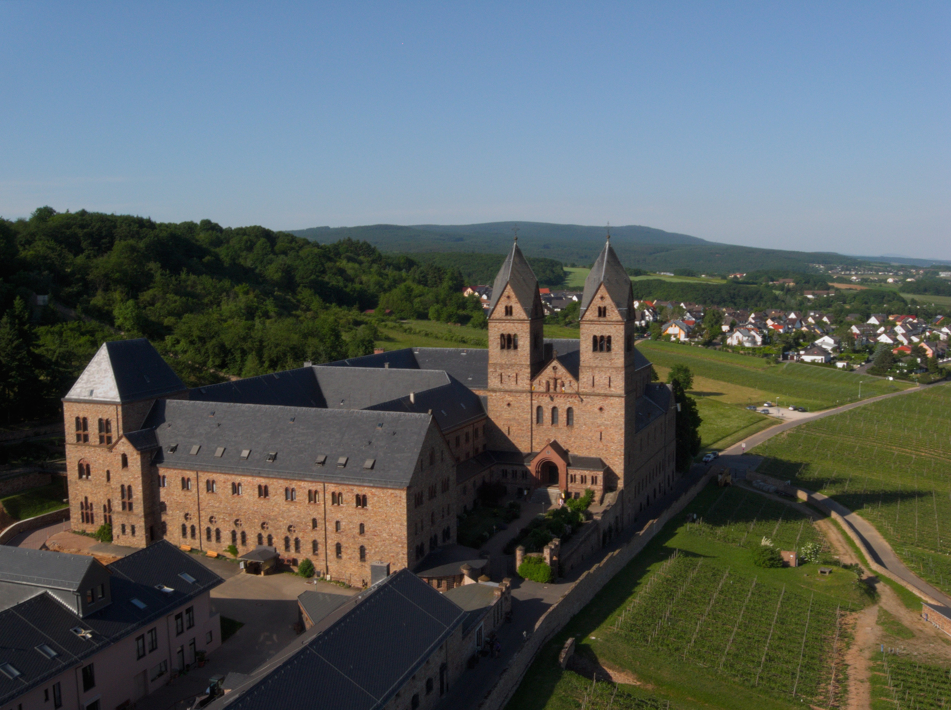 Die Abtei St. Hildegard ist eine Benediktinerinnen-Abtei in Eibingen bei Rüdesheim im Bistum Limburg.This is a photograph of an architectural monument.